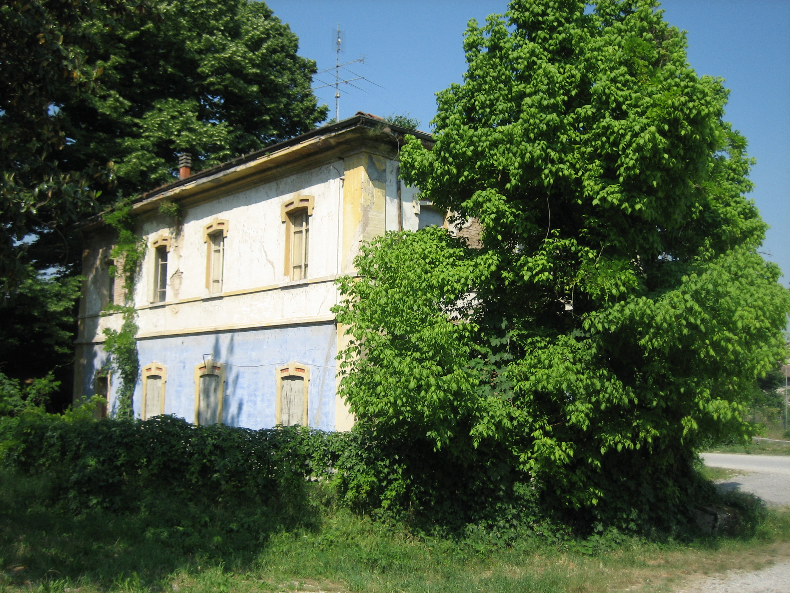 FerroviaMantovaPeschieraDelGardaStazioneDiValeggioSulMincioBorghetto_EdificioViaggiatori1.jpg